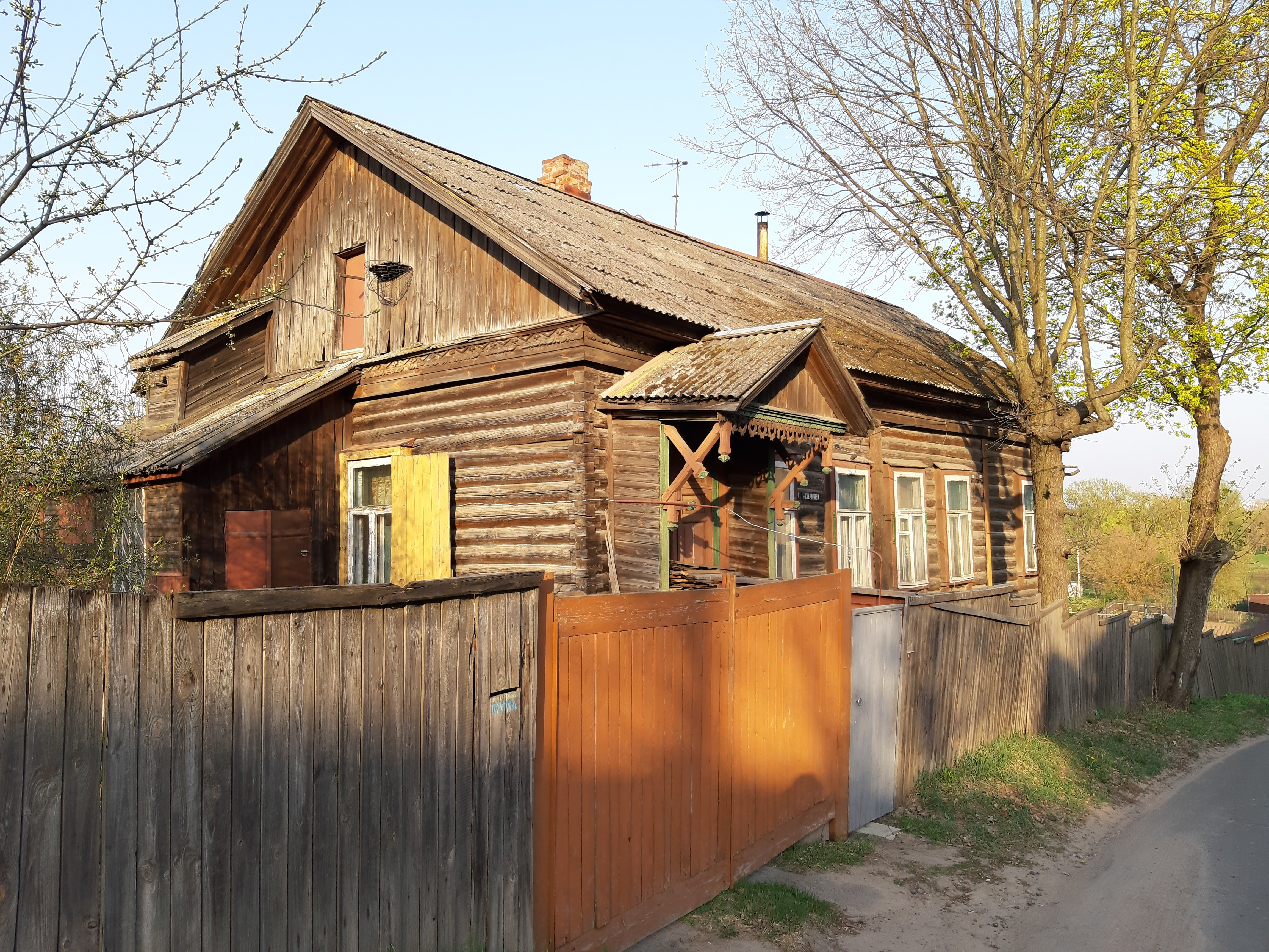 Магілёў. Вуліца Свярдлова